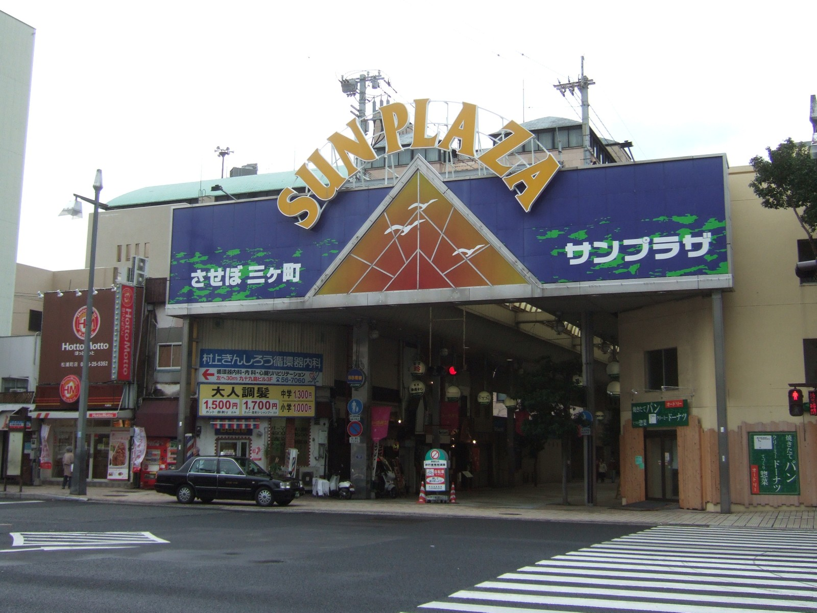 三ヶ町商店街（サンプラザ）北側出入口